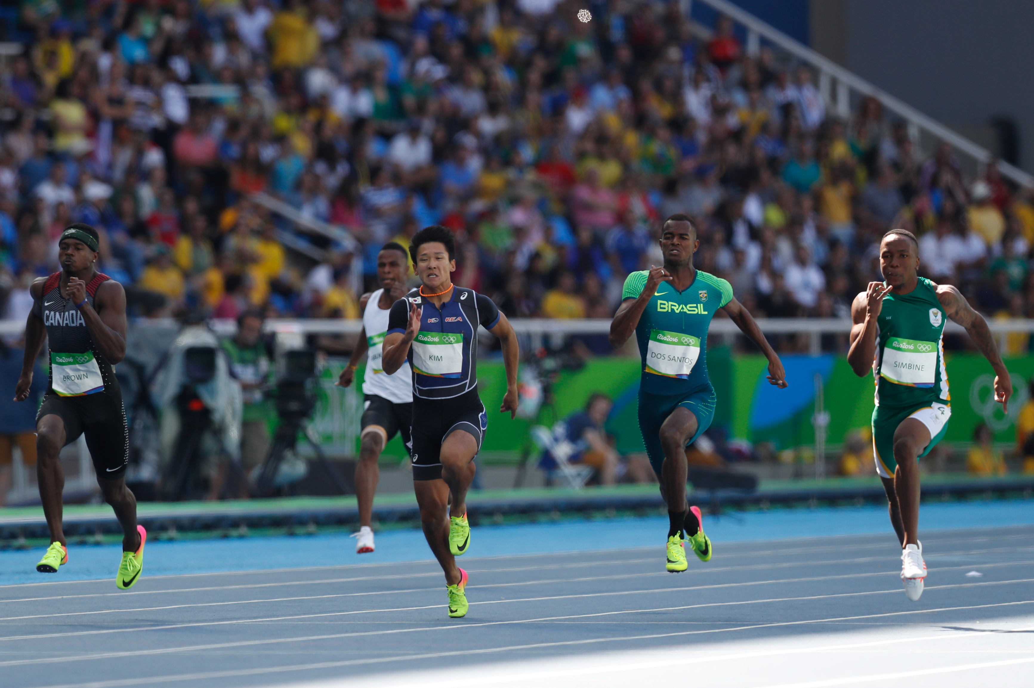 Men's 100 m sprint heats